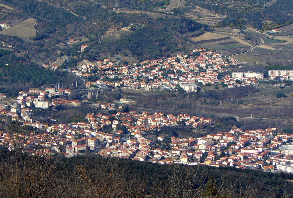 Céret vu de Fontfrède